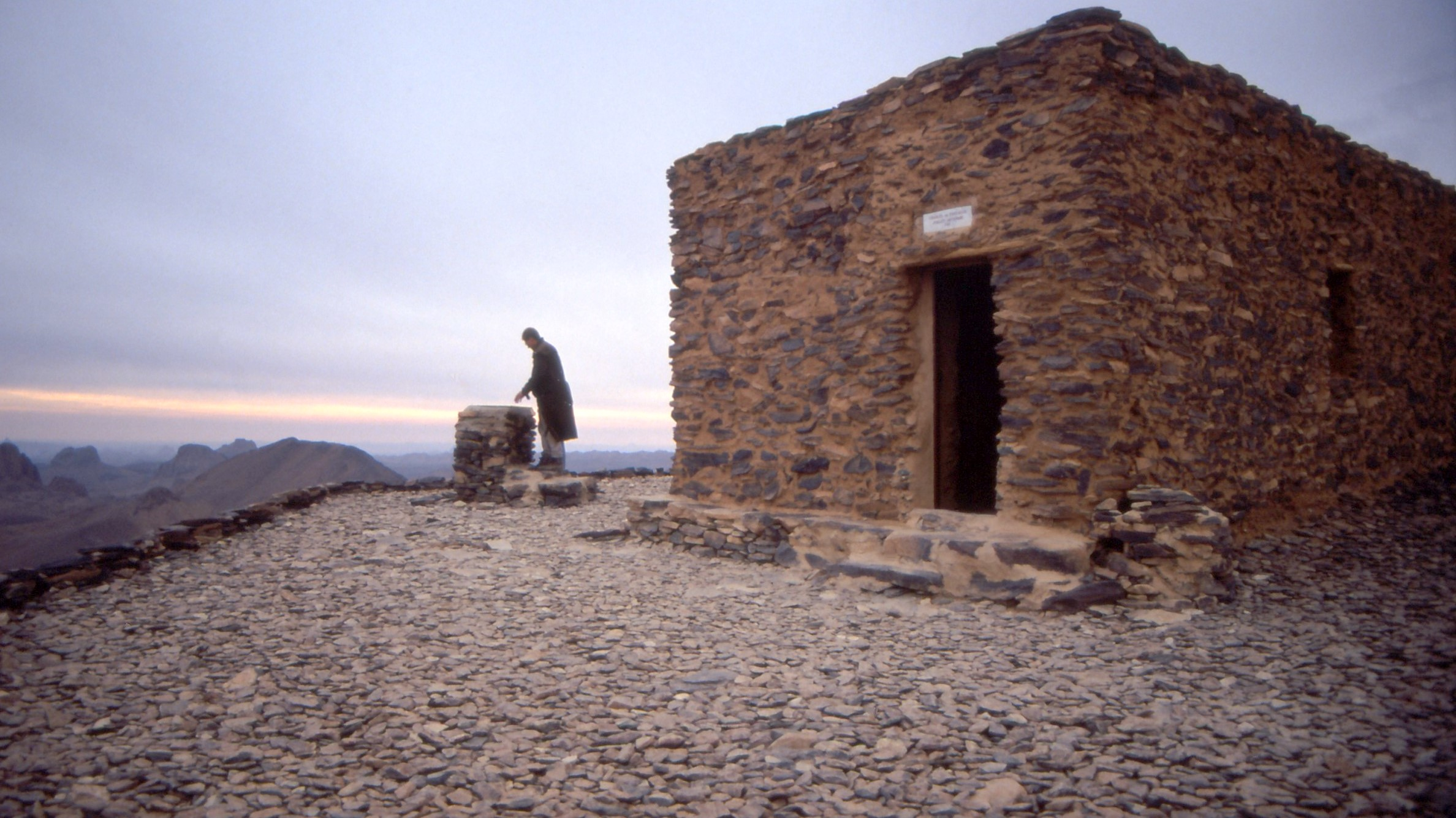 Eremitage Charles de Foucauld, Hoggar-Gebirge, Algerien